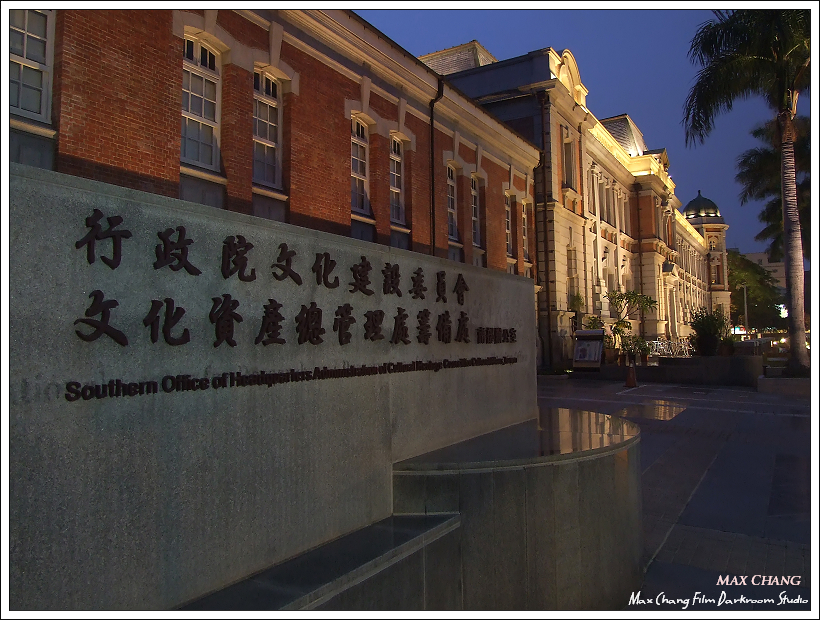 行政院文化建設委員會文化資產總管理處籌備處南部辦公室，位於原臺南州廳側廊。